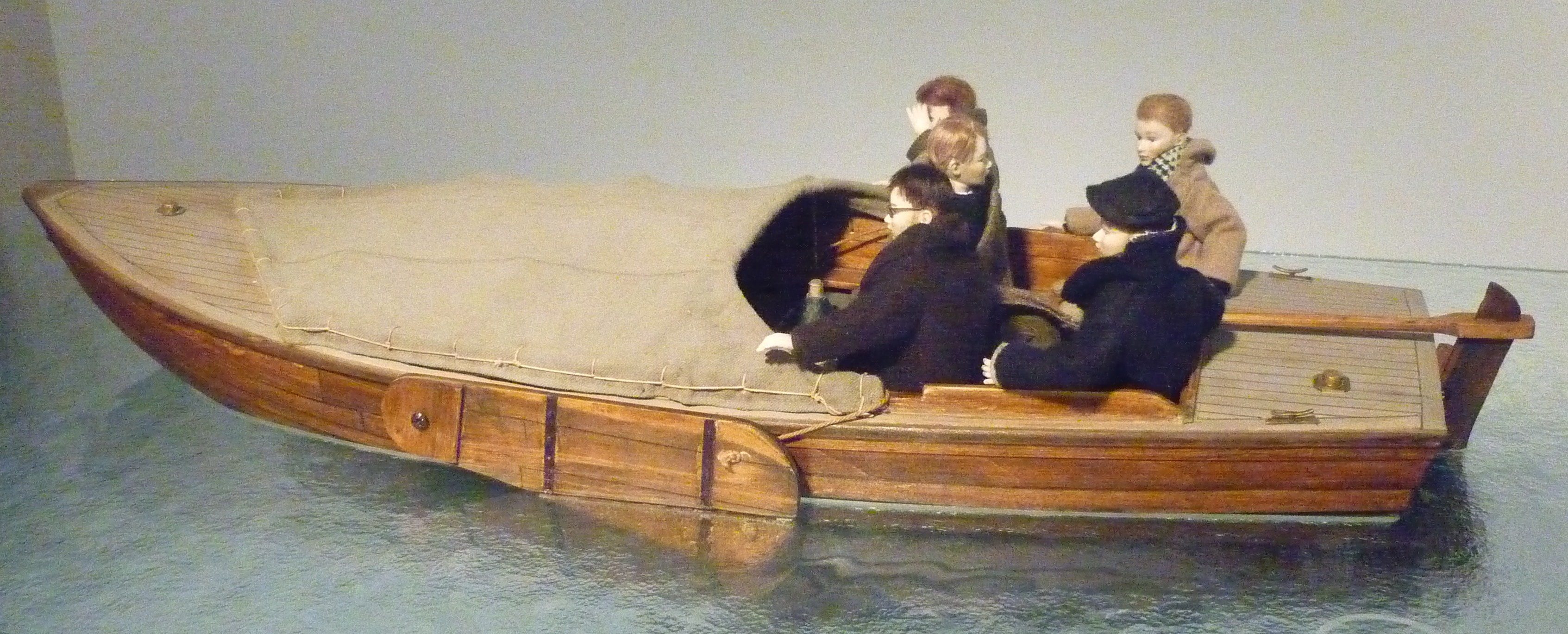 schaalmodel van de Zuiderzeevlet die de laatste Engelandvaarders naar Engeland bracht